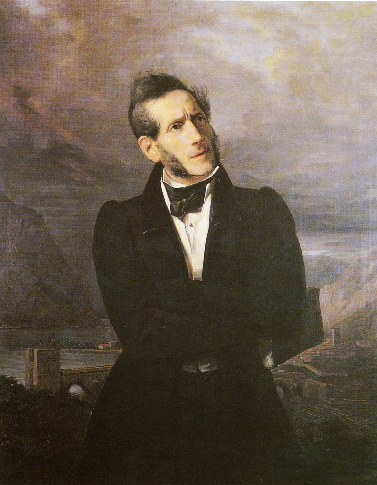 Giuseppe Molteni, Massimo Taparelli d’Azelio, Ritratto di Alessandro Manzoni, 1831, Milano, Biblioteca Braidense